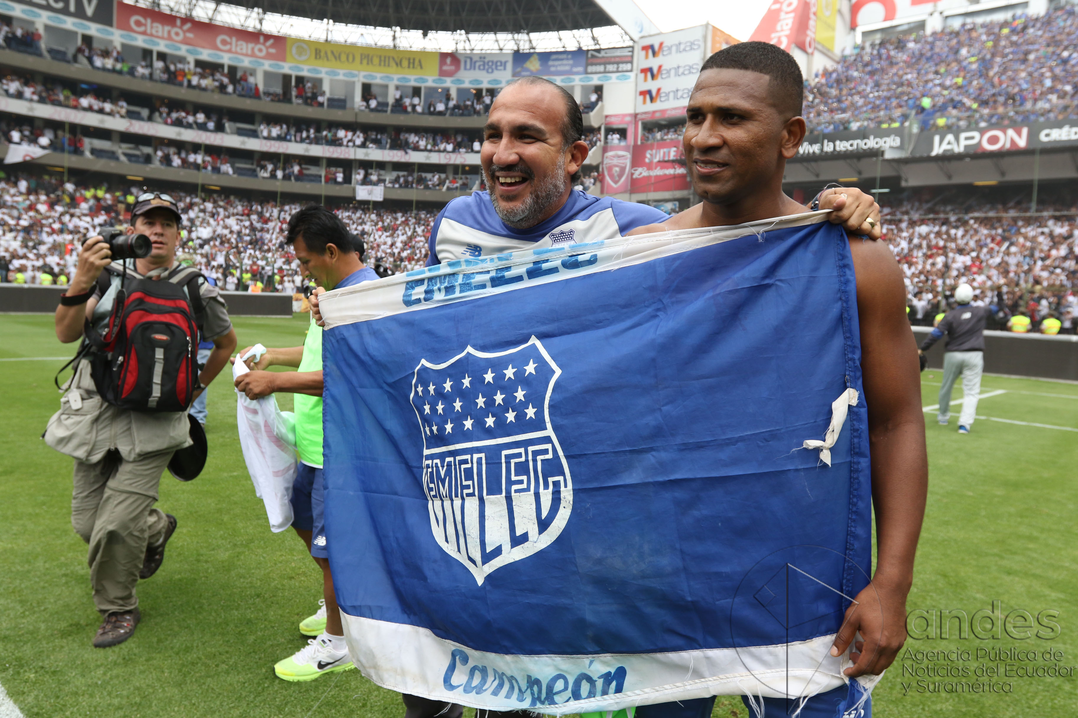 Quito, 20 dic (Andes).- Emelec gana su tercer campeonato Nacional derrotando a LDU de Quito en Casa Blanca. ANDES/Micaela Ayala V.